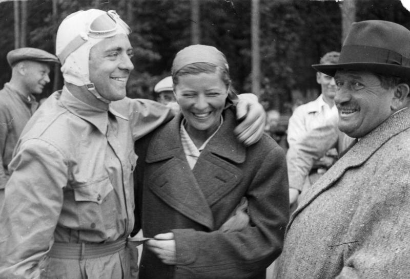 Bernd Rosemeyer, Elly Beinhorn, Ferdinand Porsche Rosemeyer fährt neuen Rekord Die Auto-Union hatte auf der Reichsautobahnstrecke bei Frankfurt/Main am Mittwoch Versuchsfahrten mit ihrem stromlinienverkleideten Avusrennwagen, mit dem Eifelsieger Bernd Rosemeyer am Steuer, durchgeführt, bei denen über den Kilometer eine Geschwindigkeit von 389,881 stdkm und über die Meile eine solche von 378,423 stdkm erreicht wurden. Der neue Rekordsieger strahlt über das ganze Gesicht, als ihm seine Gattin, Elli Beinhorn-Rosemeyer, und der Konstrukteur der Auto-Union-Rennwagen, Dr. Porsche, zu seinem Siege beglückwünschen. 16.6.1937 [Herausgabedatum] [Bei Frankfurt am Main.- Rennfahrer Bernd Rosemeyer, Fliegerin Elly Beinhorn, Ferdinand Porsche] Abgebildete Personen: Rosemeyer, Bernd: Automobilrennfahrer, verheiratet mit Elli Beinhorn, Deutschland (GND 118749722) Beinhorn, Elly: Sportfliegerin, Schriftstellerin, Deutschland (GND 118508490) Porsche, Ferdinand Prof. Dr. Ing.: Konstrukteur des Volkswagens, Deutschland (GND 118595881)